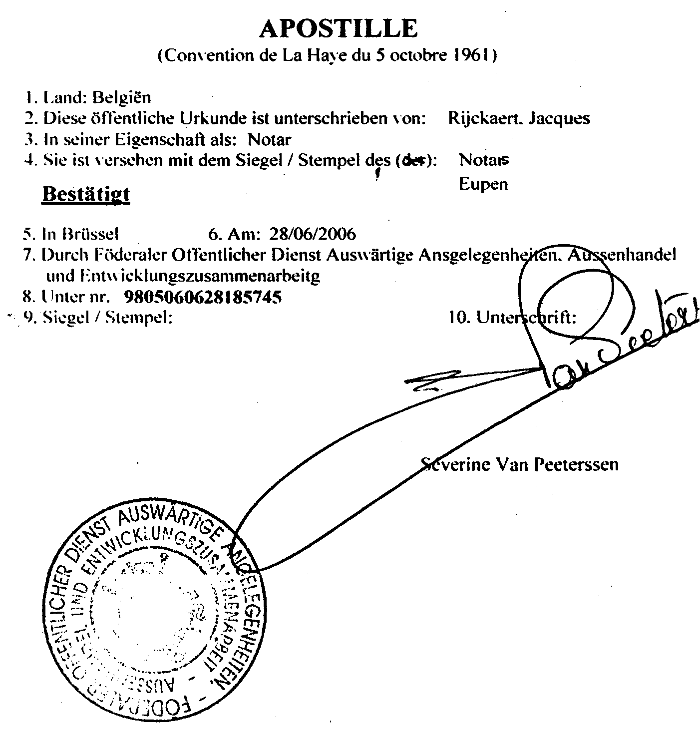 Апостиль (Бельгия), Apostille